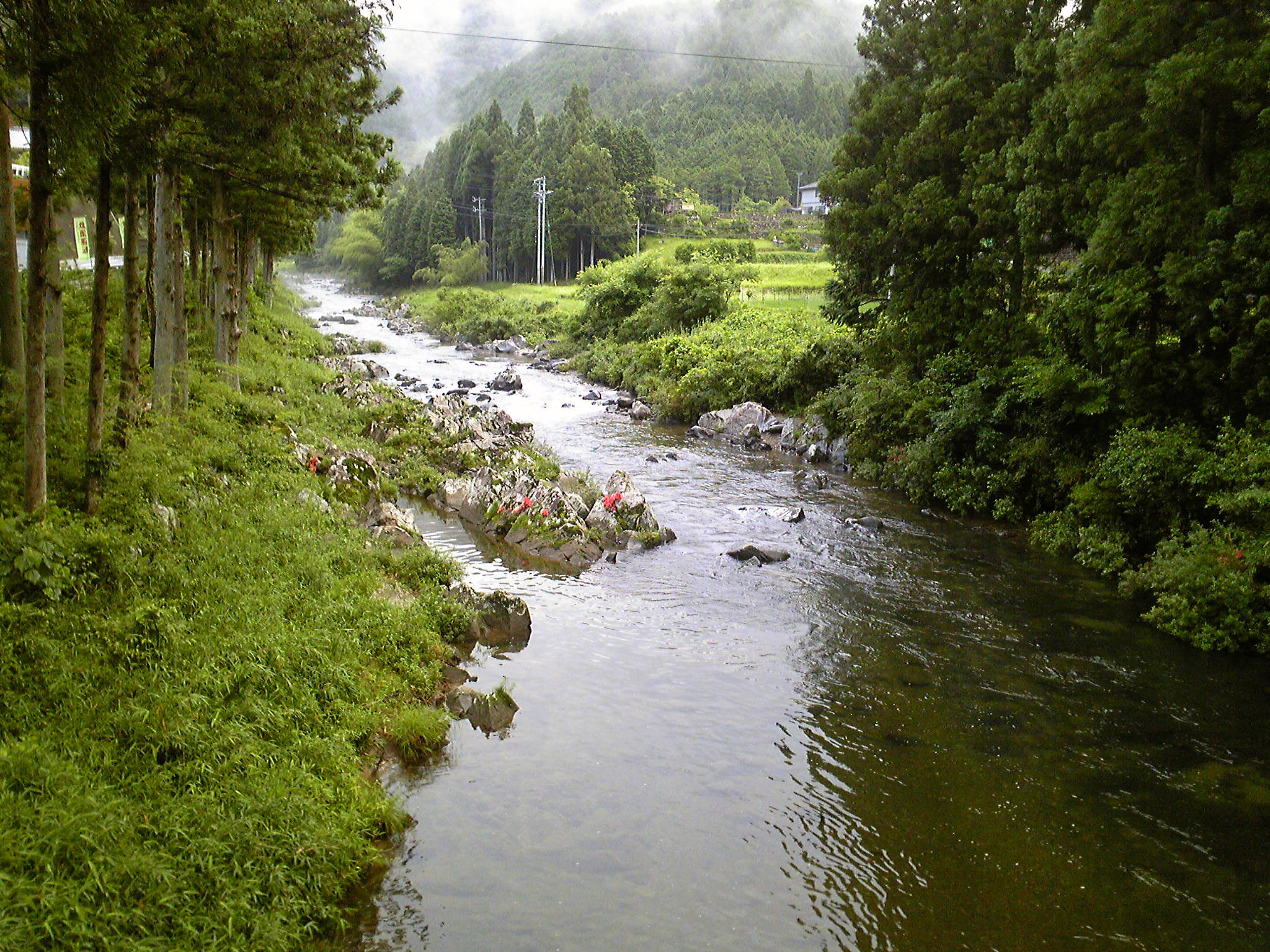 上麻生から神渕へ抜ける途中の場所です。